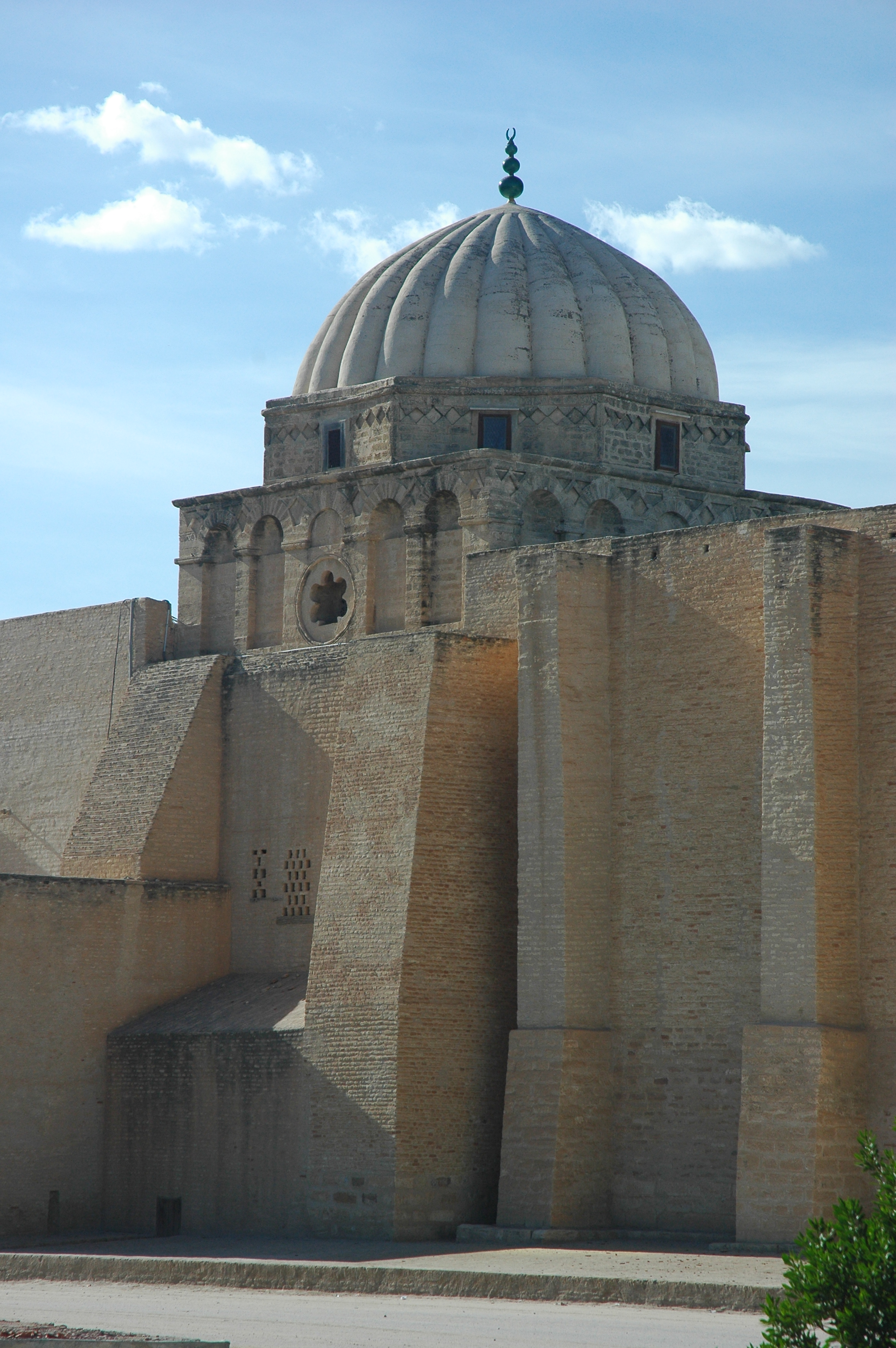 Kairouan Tunisie